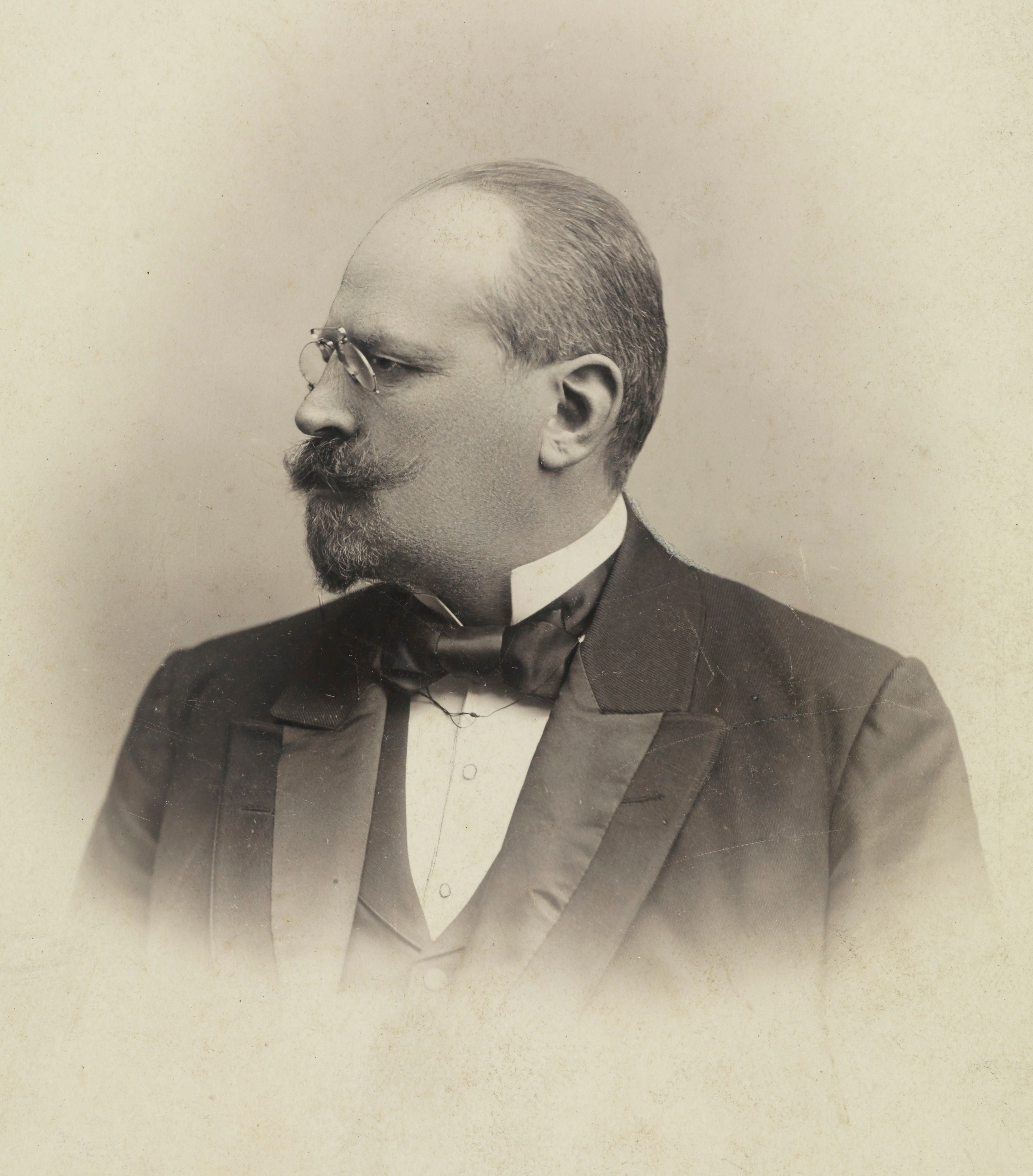 Adwokat Michał Węsławski, po 1890 r.